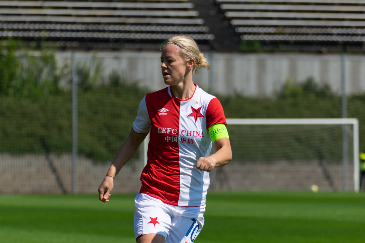 Blanka Pěničková vs Sparta Praha (women)